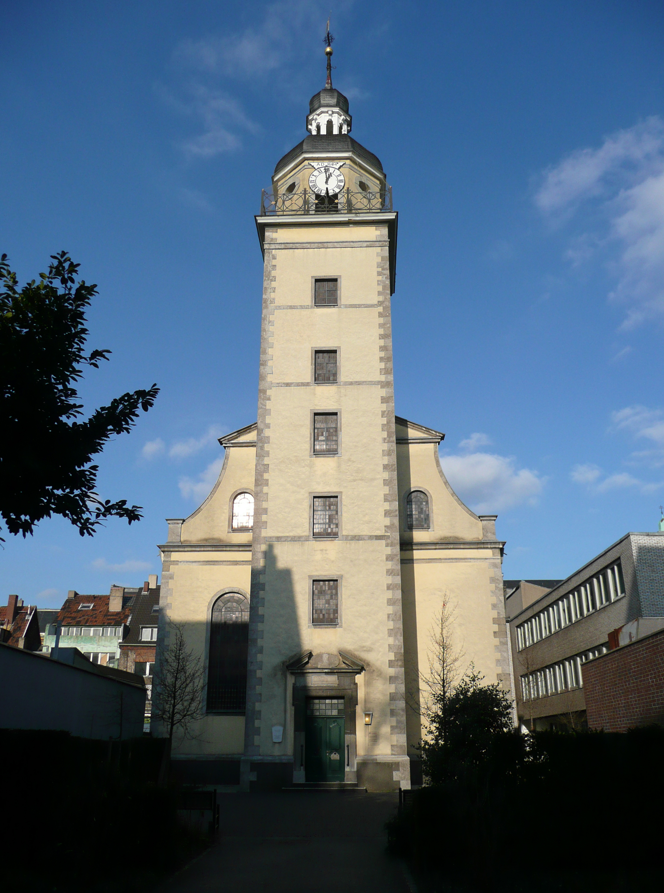 Neanderkirche in Düsseldorf